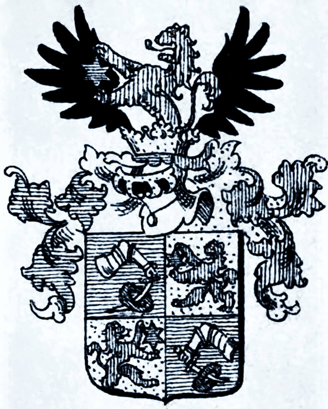 Wappen der Wisner von Morgestern 1792